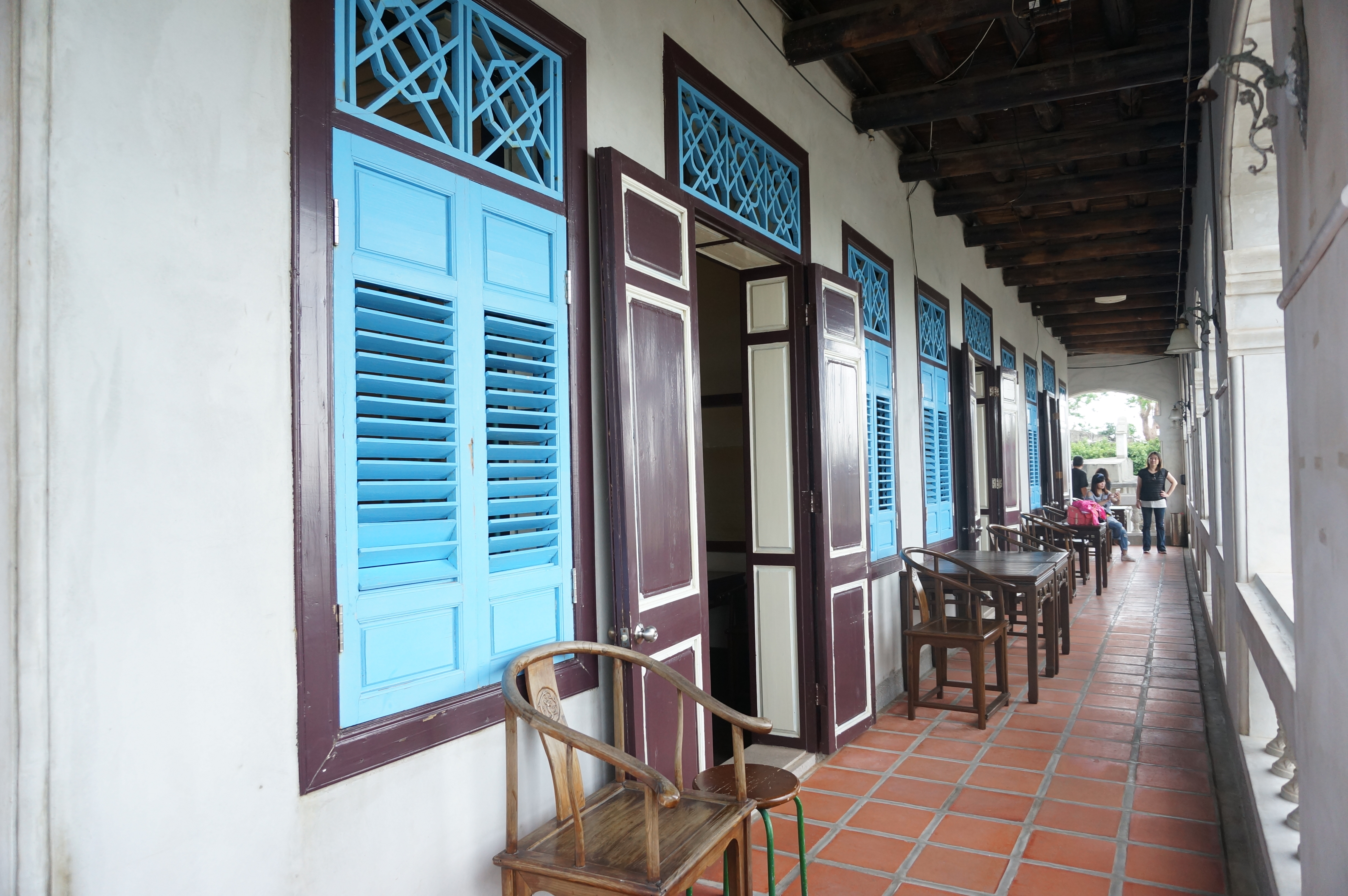 中式的門楣帶有閩南建築風格